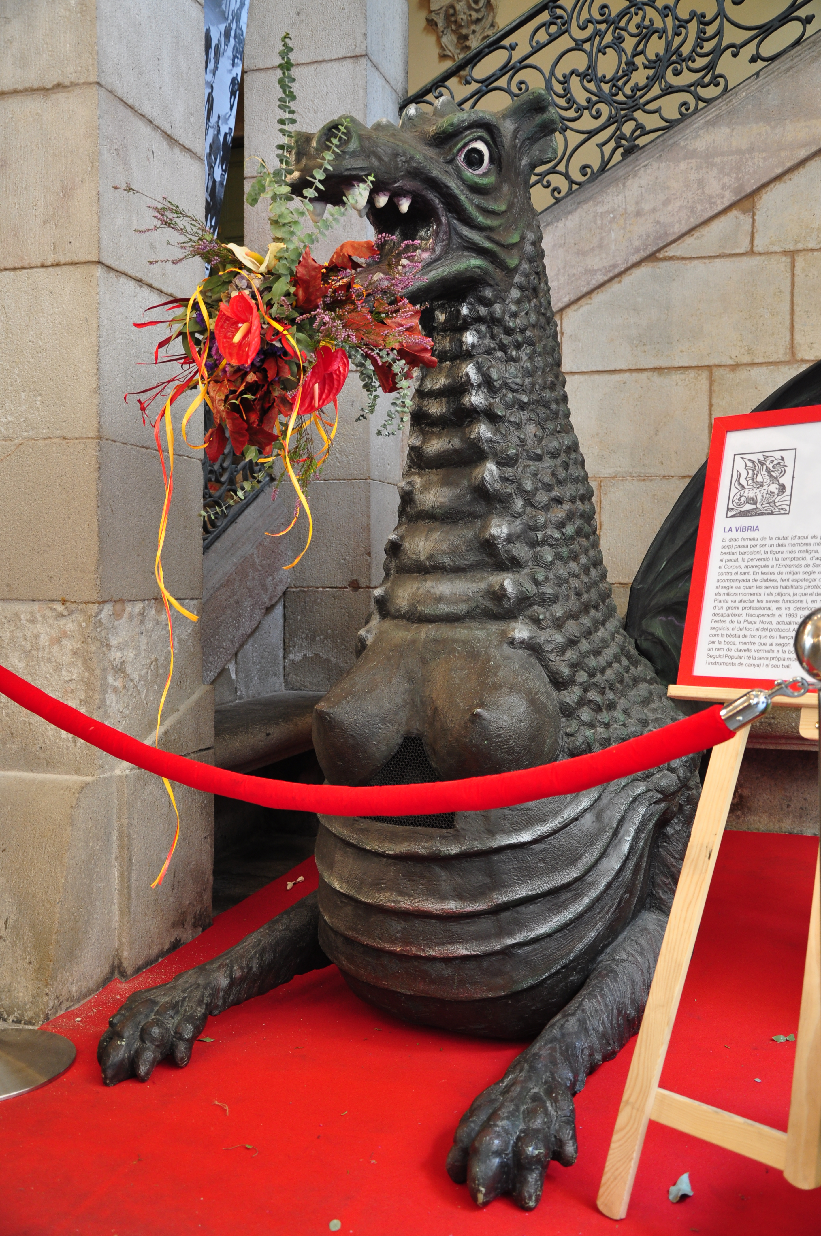 Mercè 2012. Drac femella de la ciutat de Barcelona expossat al Palau de la Virreina.